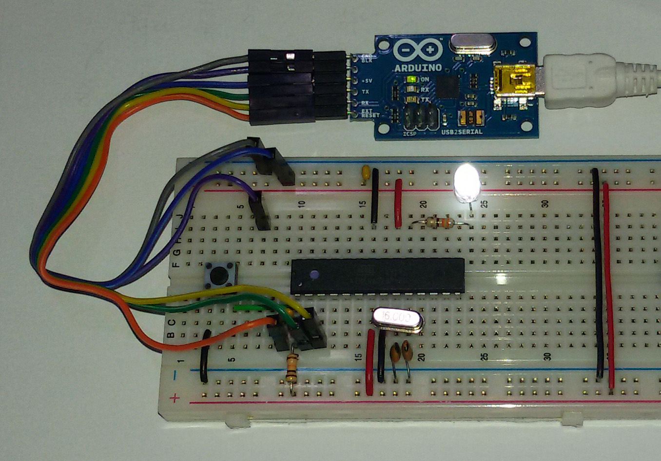 브레드보드 아두이노 ATmega328P와 USB2Serial 연결 예